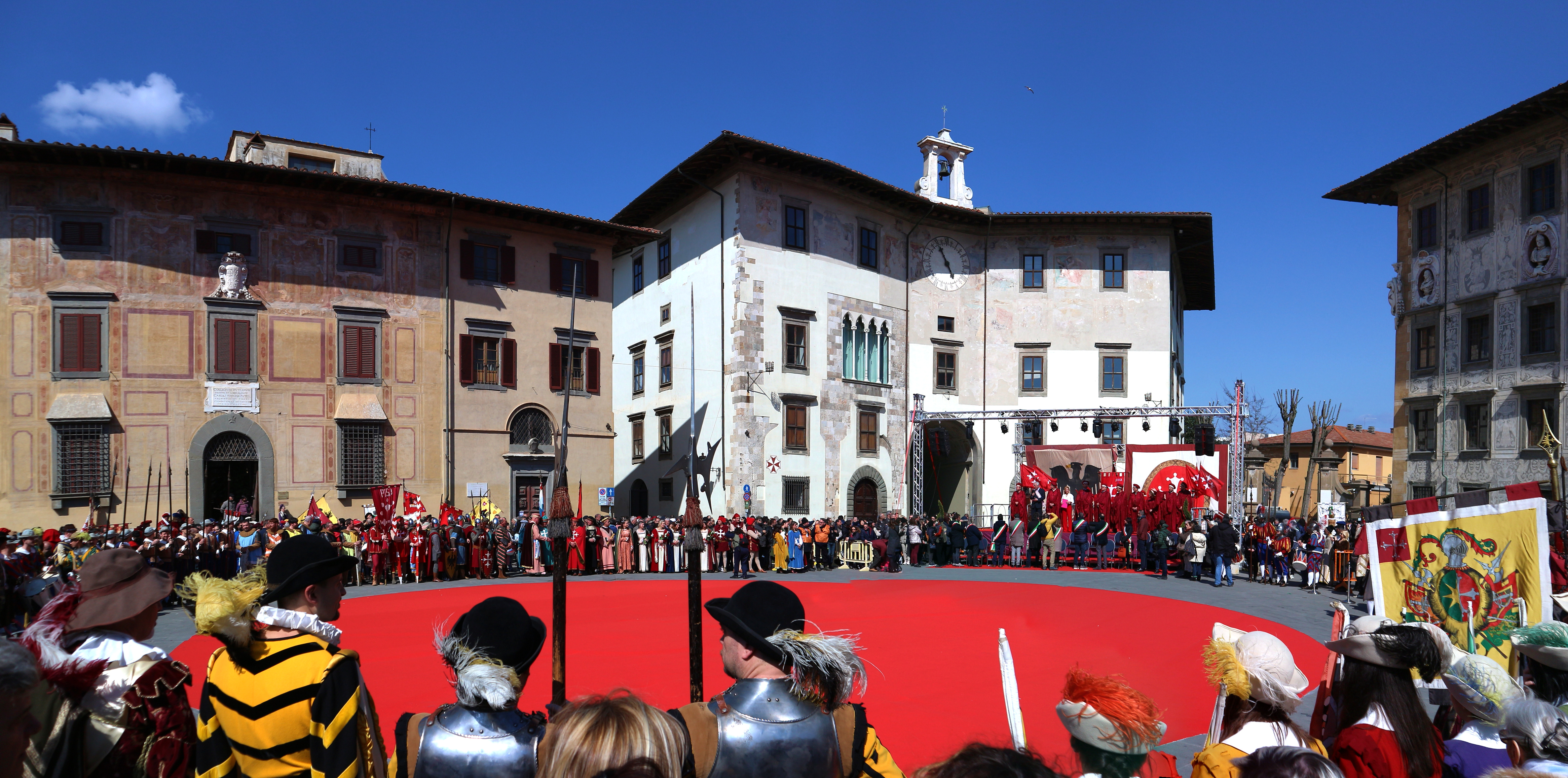 Celebrazione del Capodanno Pisano 2019 - 25 marzo 2018 11:02